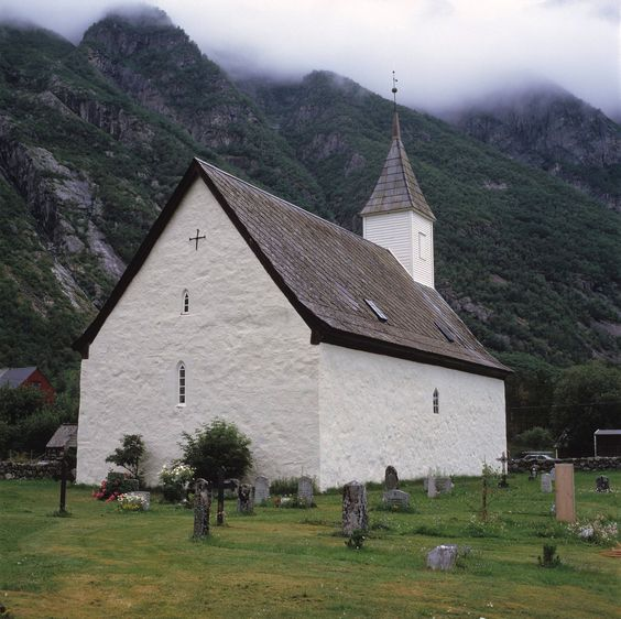 Eidfjord gamle kirke